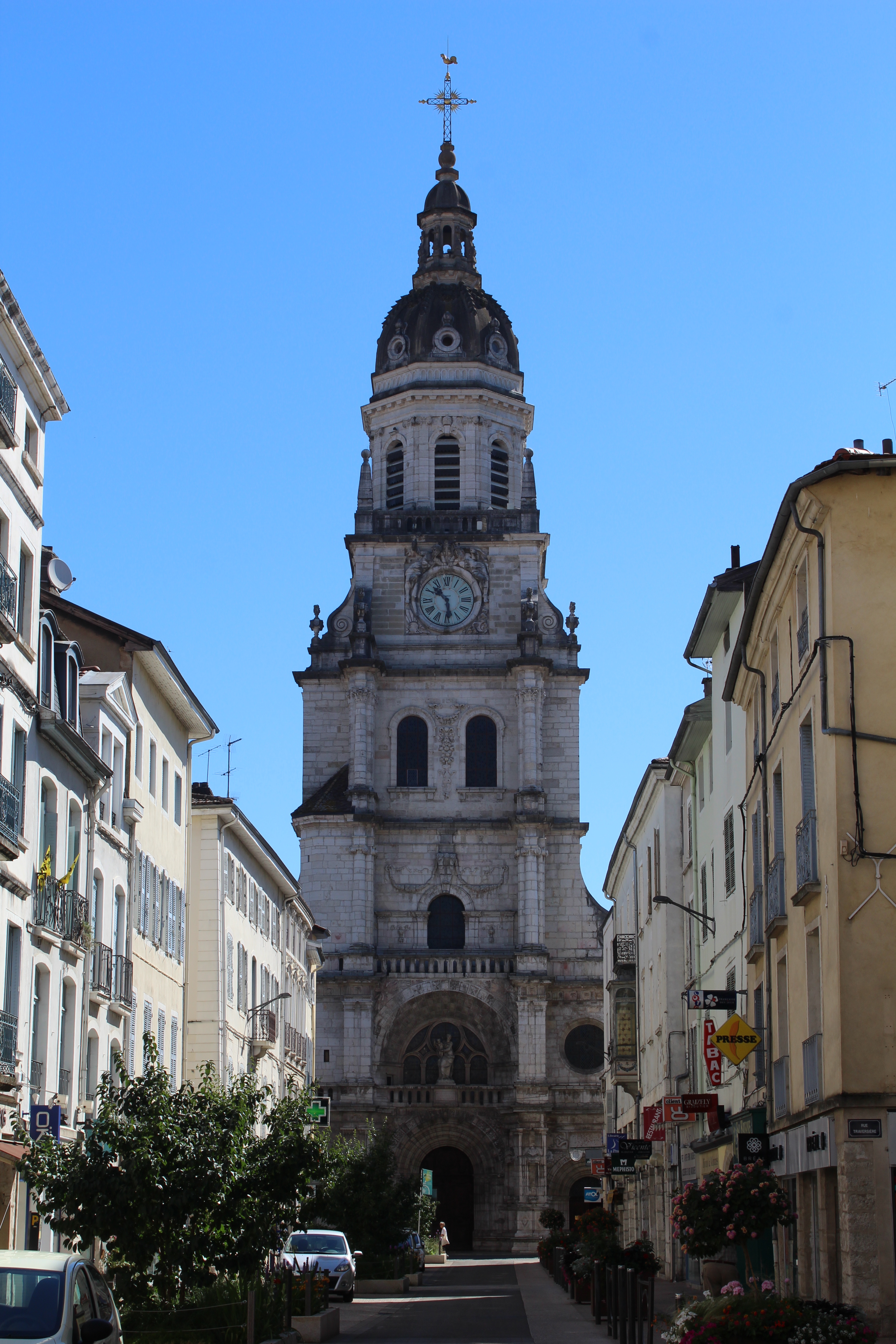 Cocathédrale Notre-Dame de l'Annonciation de Bourg-en-Bresse.